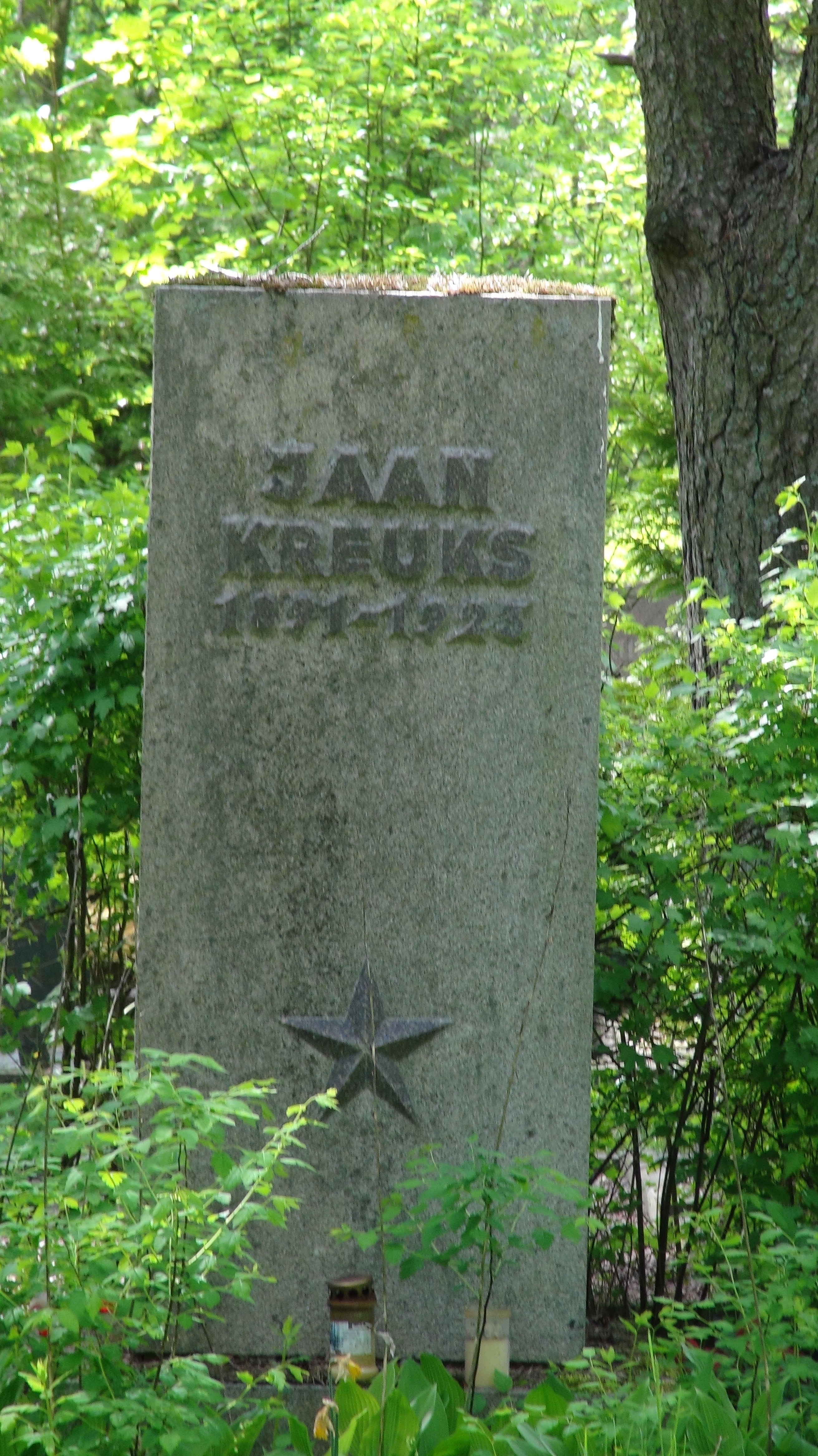 Jaan Kreuksi hauakivi